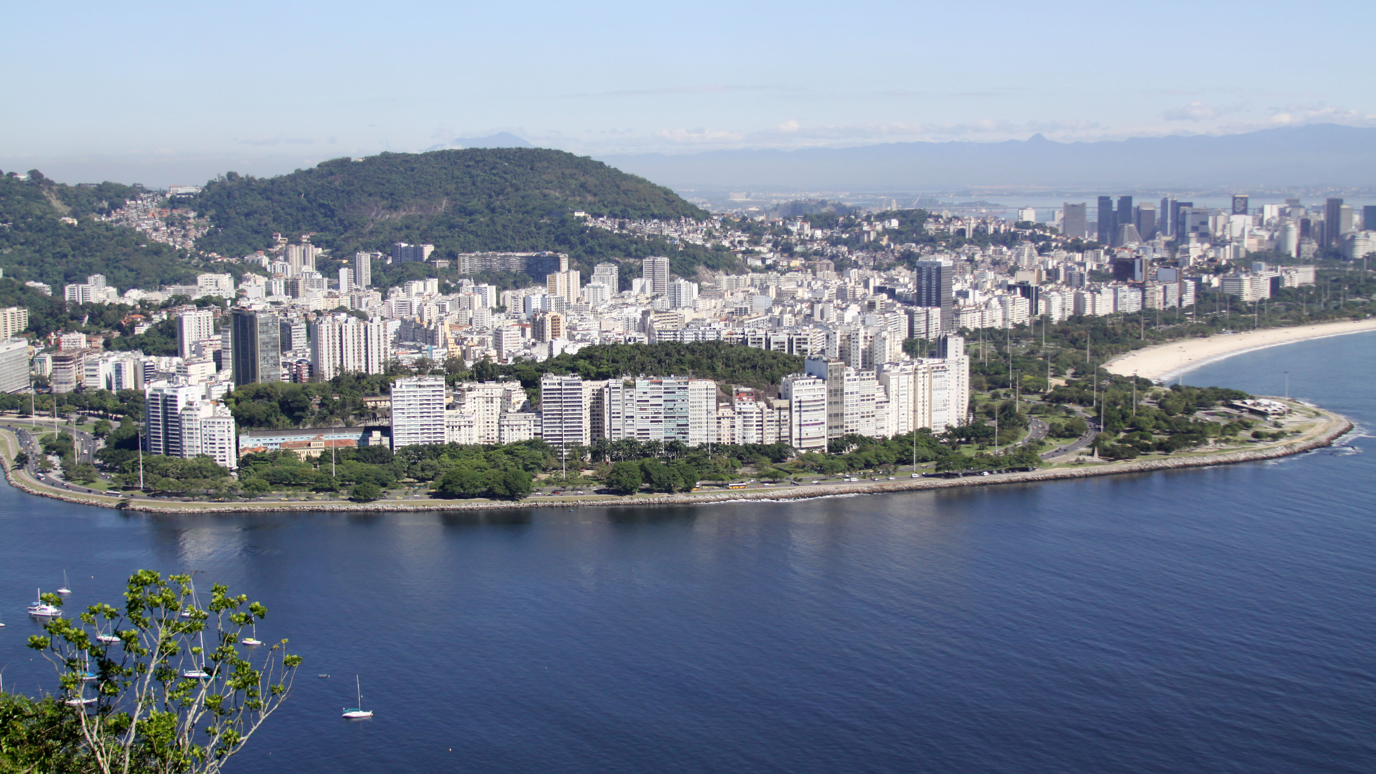 Morro da Viúva visto do Morro da Urca